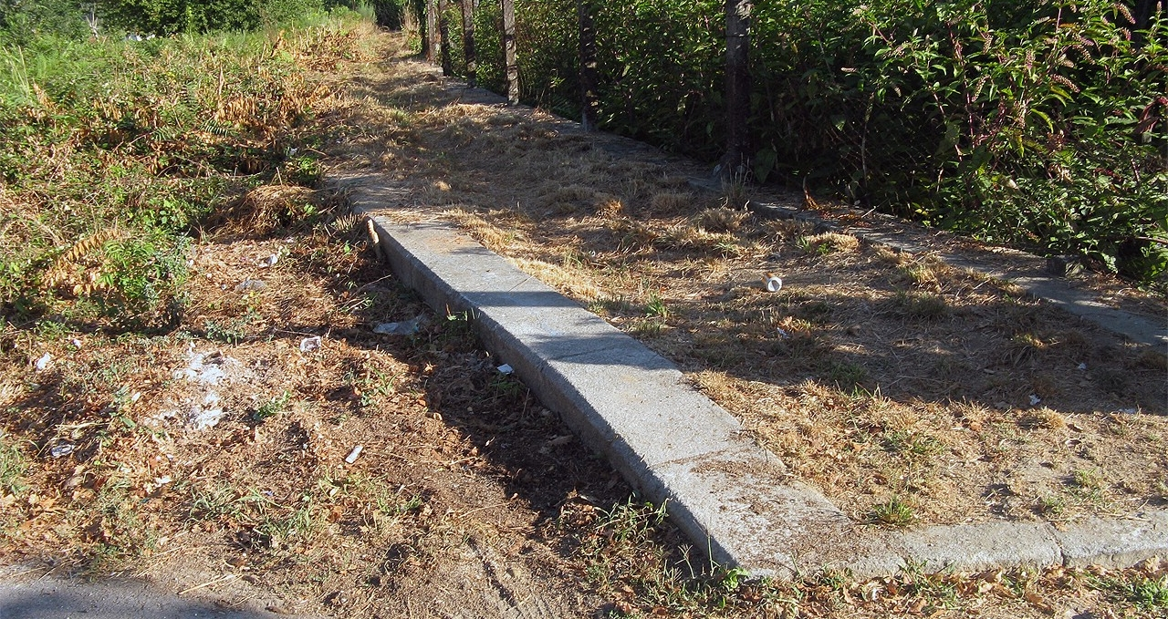 Para quem afirmava que Britelo já não existe, engane-se. O apeadeiro sempre existiu. Apenas nunca teve abrigo e apenas teve uma placa em cimento com o seu nome (algo que já não está lá). A plataforma é pequena, não tendo mais de 50 metros (caberia ao que dá a crer 2 Nohab's 9100 no máximo).